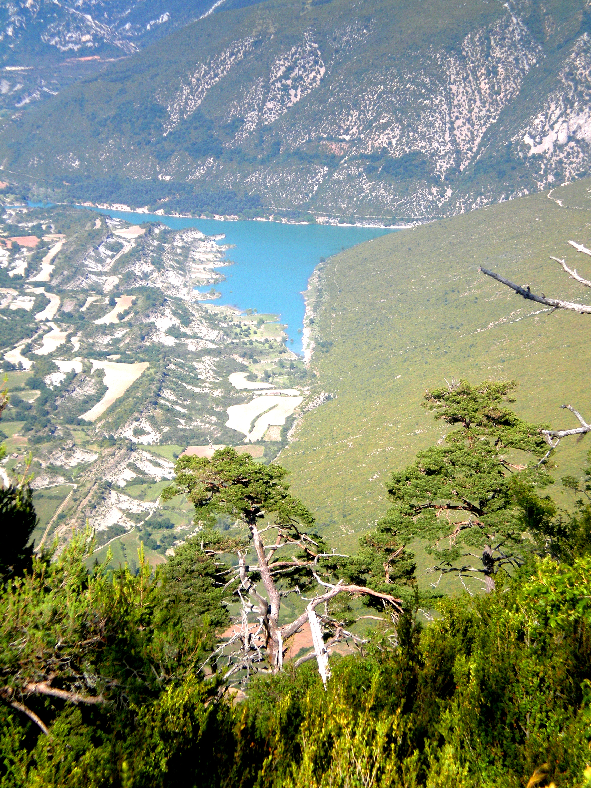 pantano de belsue